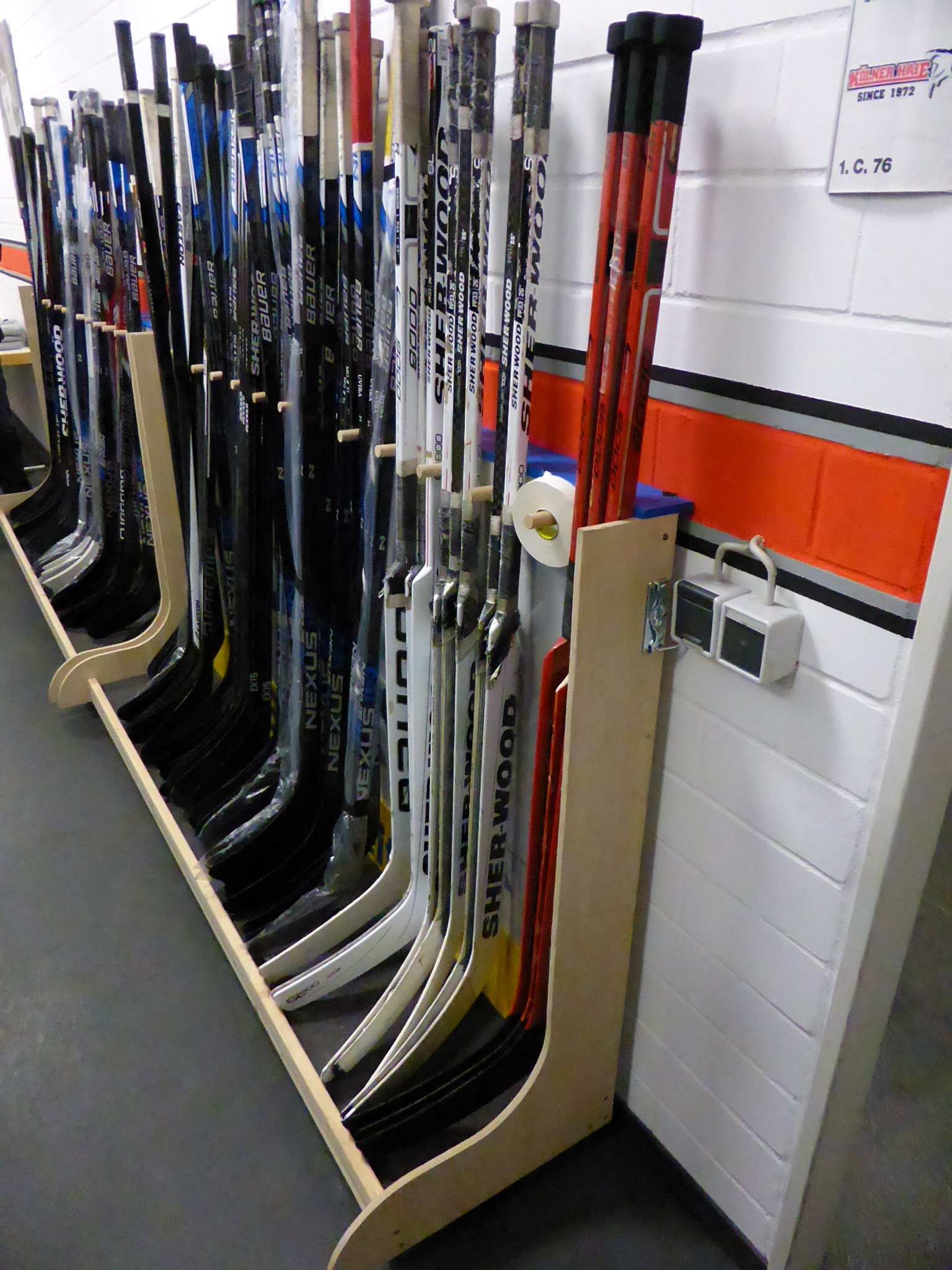 Eishockeyschläger im Trainingszentrum (Kölnarena 2) des KEC.